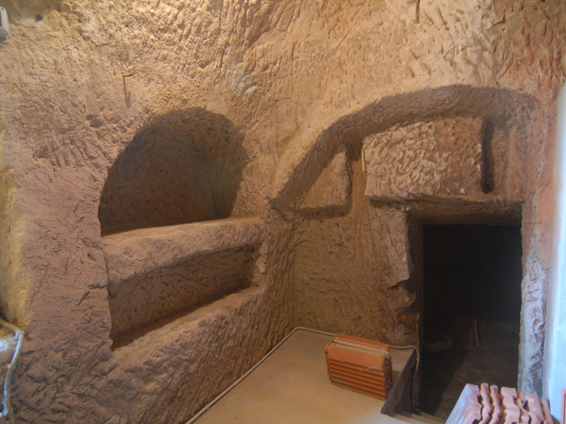 Infernòt Carlini Un articolato infernòt multicamera con picconature a vista e tavolo centrale. This is a photo of a monument which is part of cultural heritage of Italy.